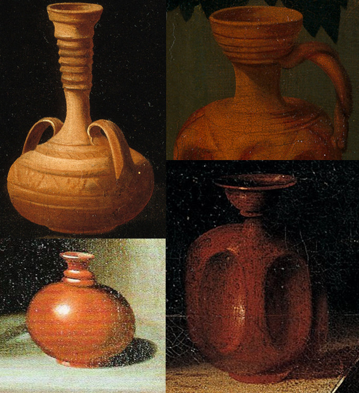 Cuatro modelos de búcaros retratados en distintos bodegones de pintores del Siglo de oro español